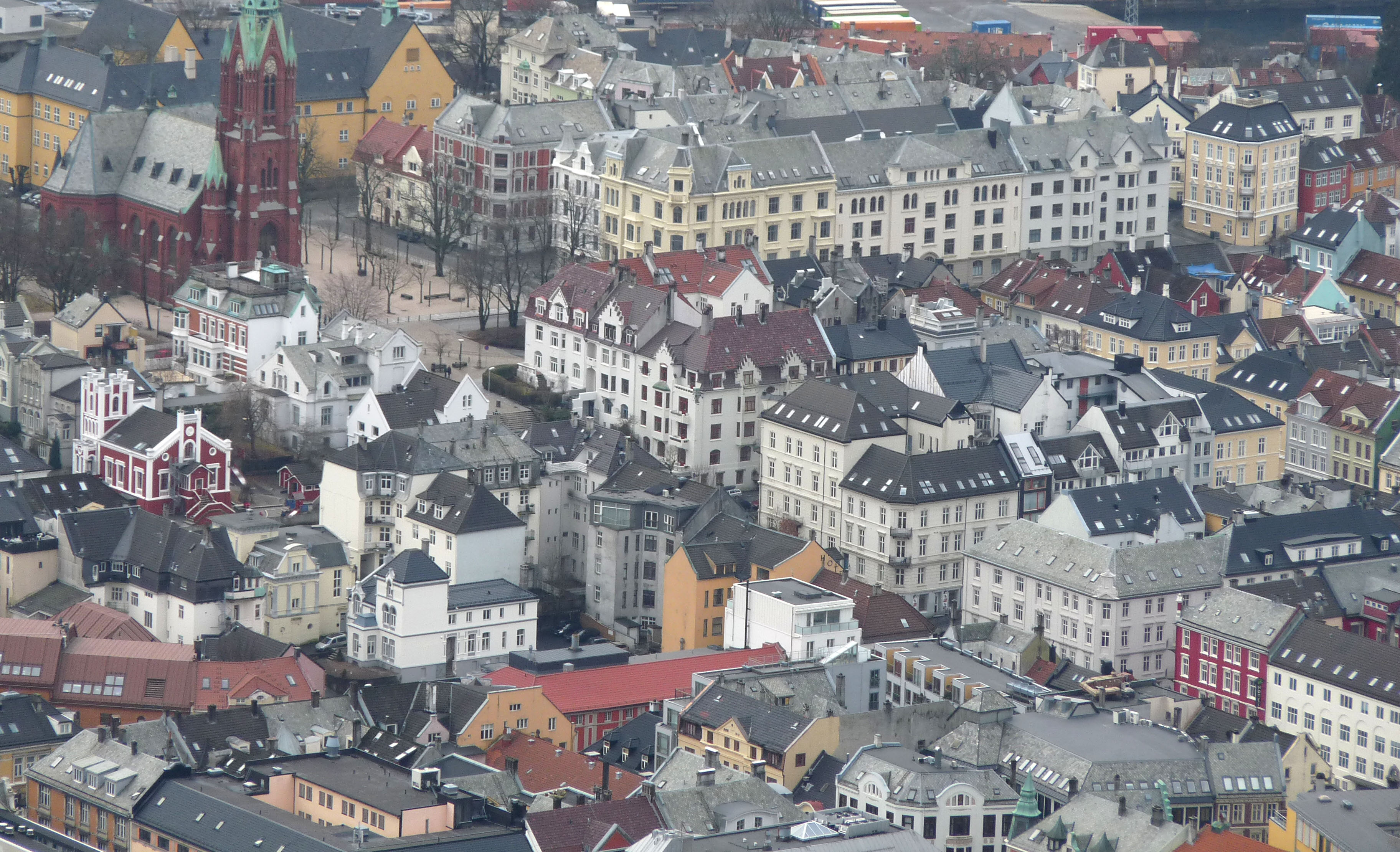 Bergen 10